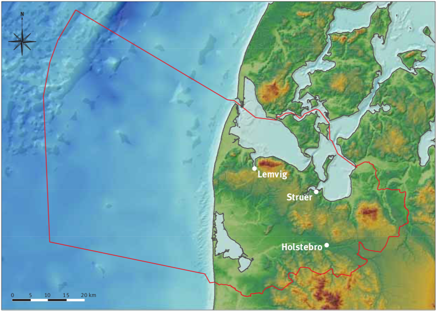 Omrids af Geopark Vestjylland